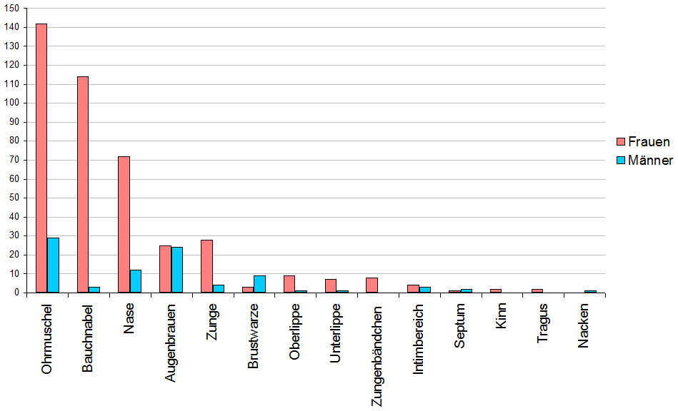 Aufteilung von 506 Piercings bei 389 Piercing-Trägern in einer Studie aus dem Jahr 2008.